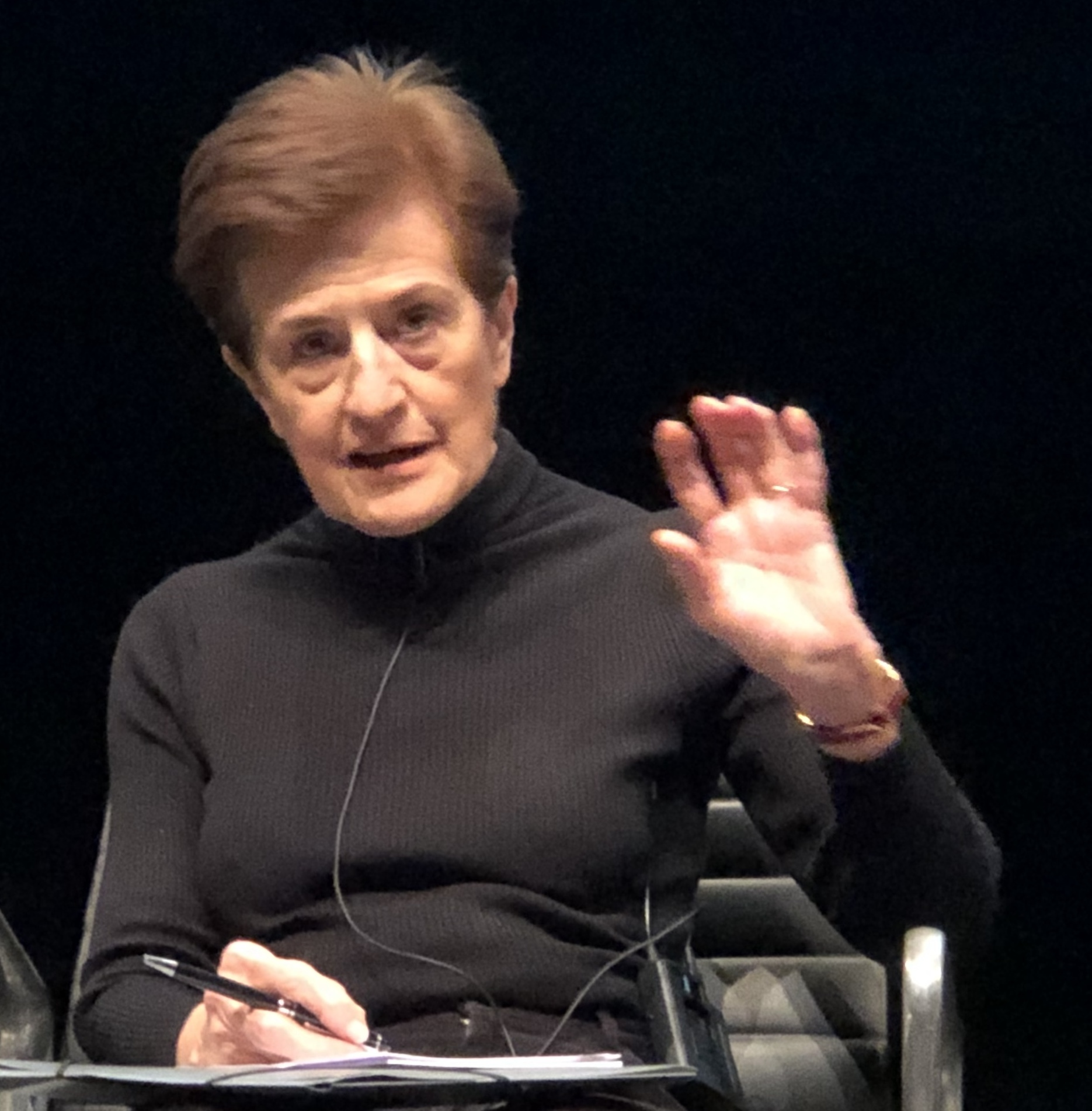 II Festival de Filosofía de Málaga